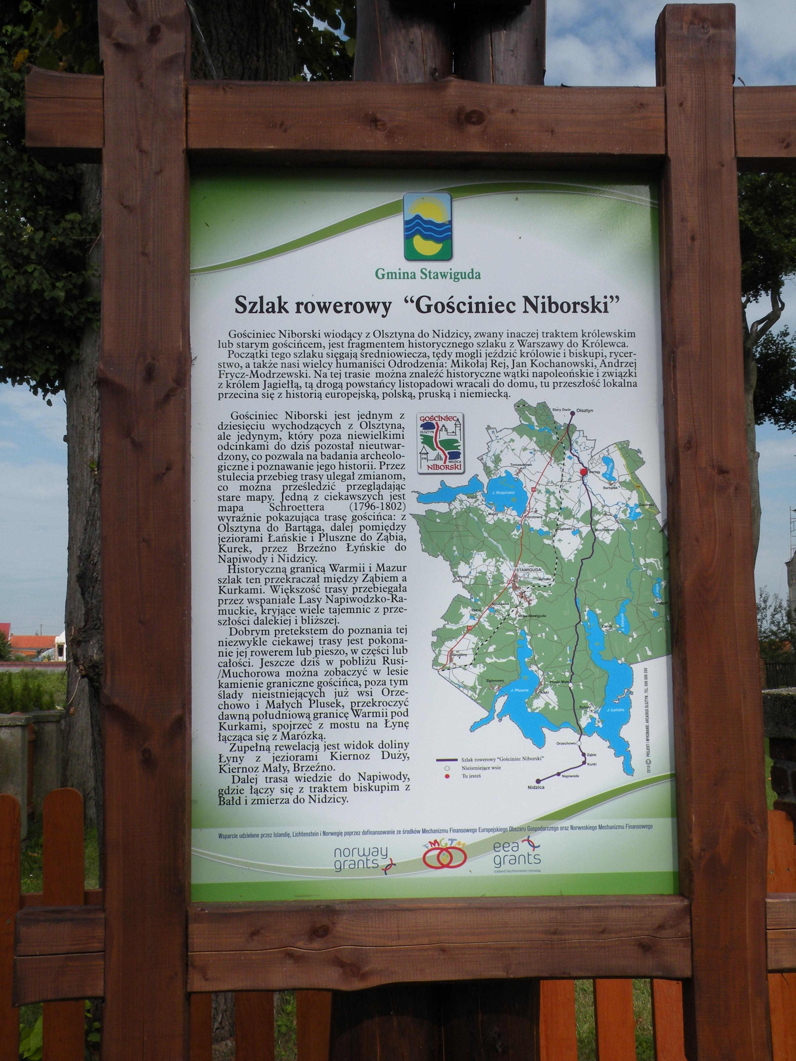 Tablica informacyjna z trasą Gościńsca Niborskiego, przed kościołem w Bartągu.